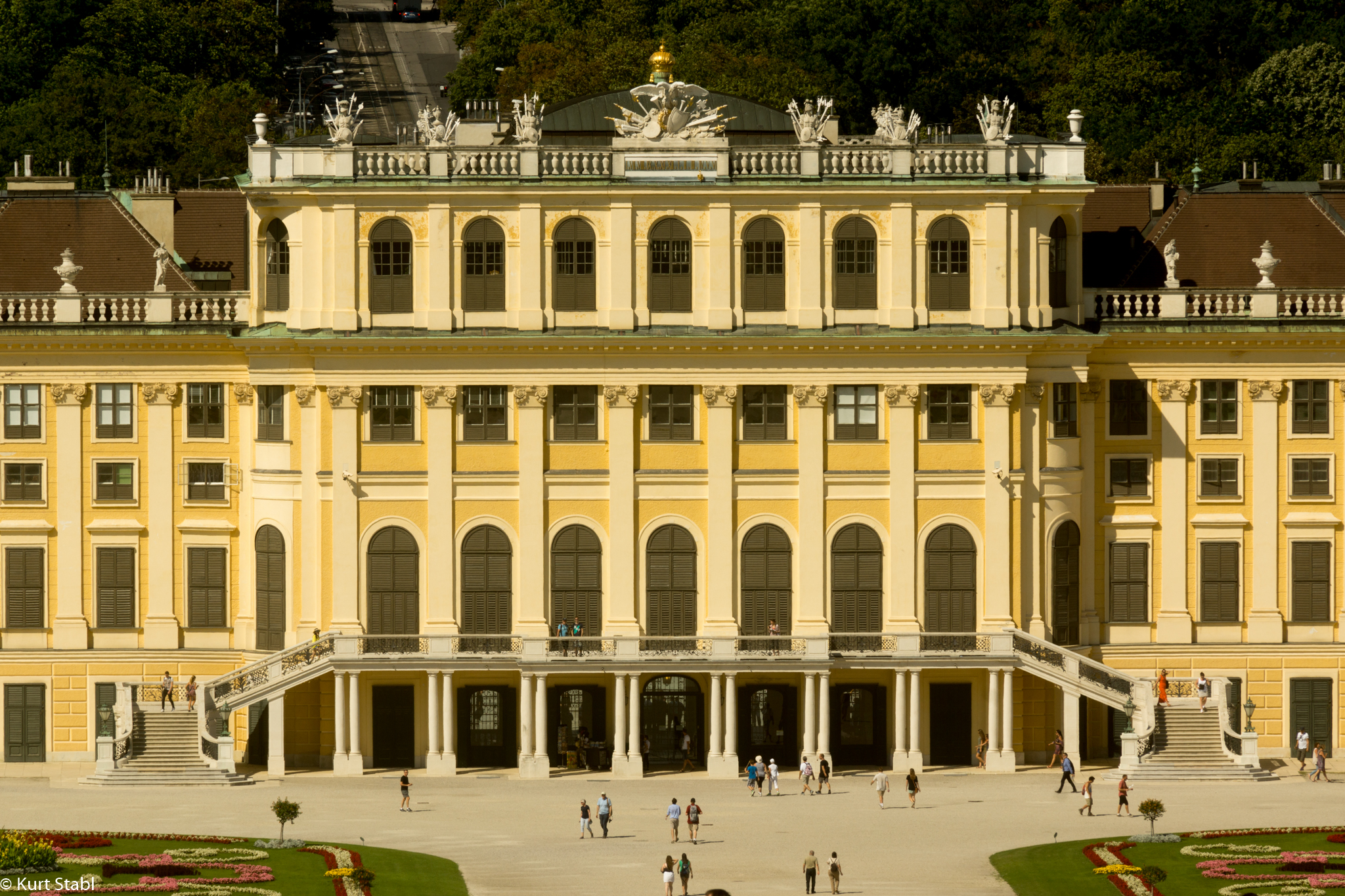 Schloss Schönbrunn, Wien, Österreich